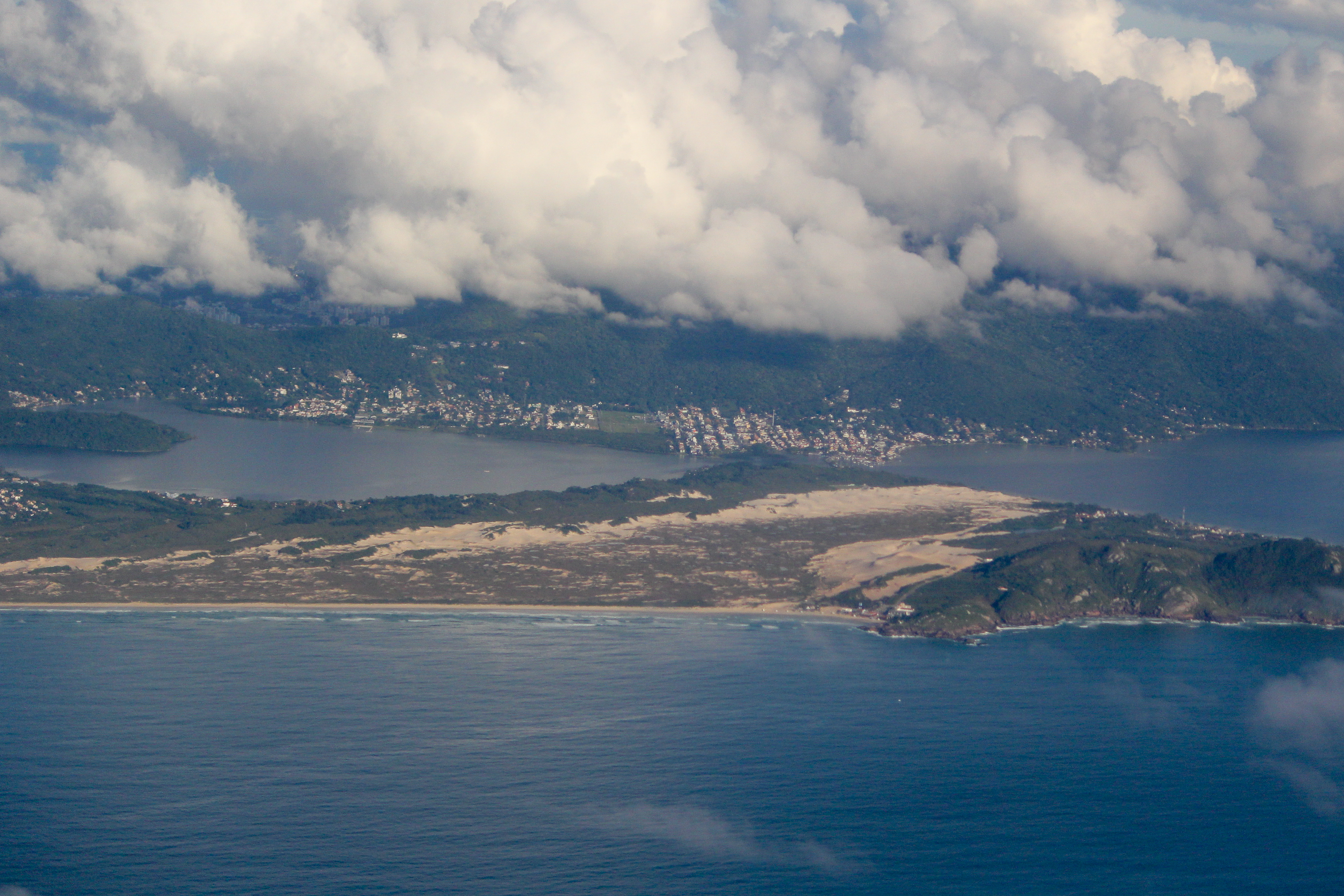 Vista aérea da Praia da Joaquina